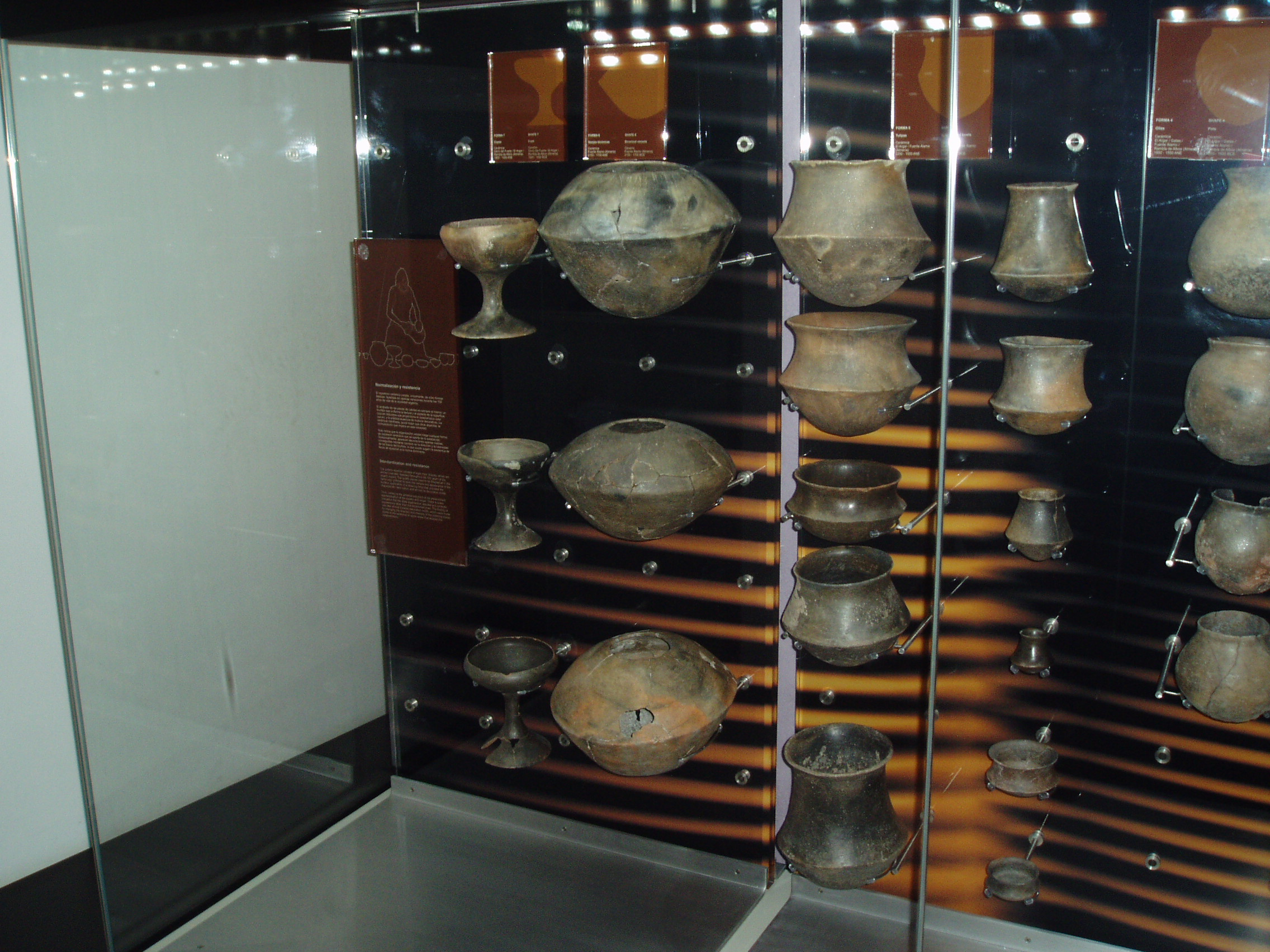 Tipologia de la ceramica argarica segun las investigacions de Luis Siret. Museo de Almeria, España.